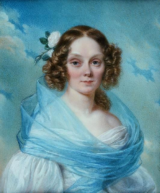 Marianna Kwilecka (ok. 1768-1838)